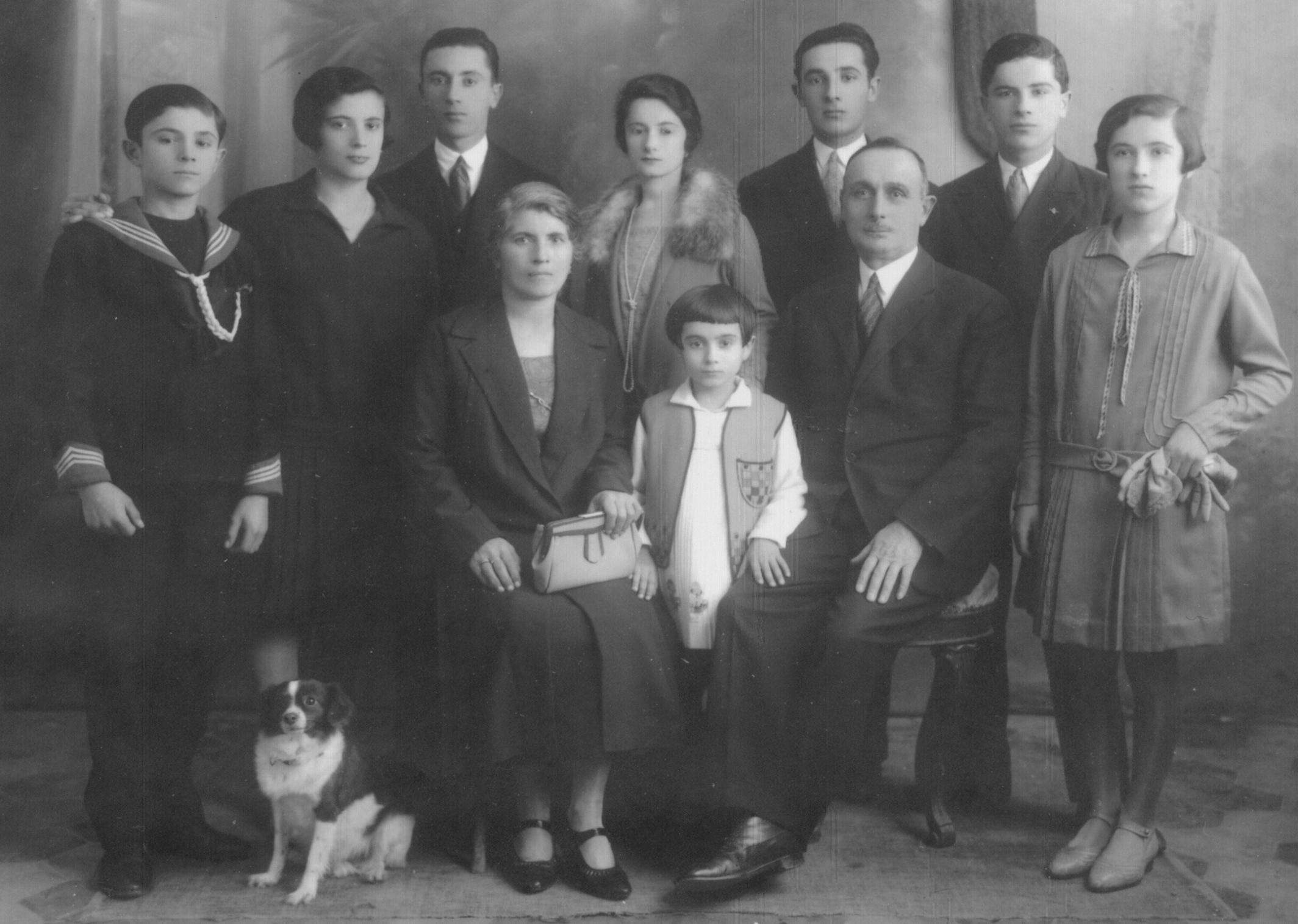 La famiglia di Giuseppe Riggio. Seconda metà degli anni Venti del XX secolo. Sulla sinistra, Silvio Riggio.